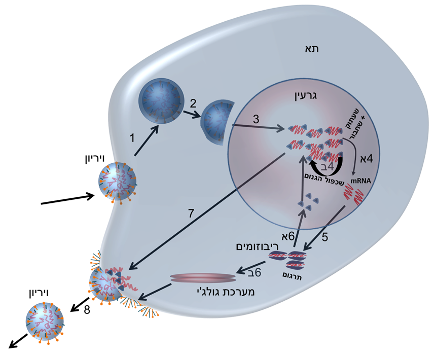 Influenza_replication